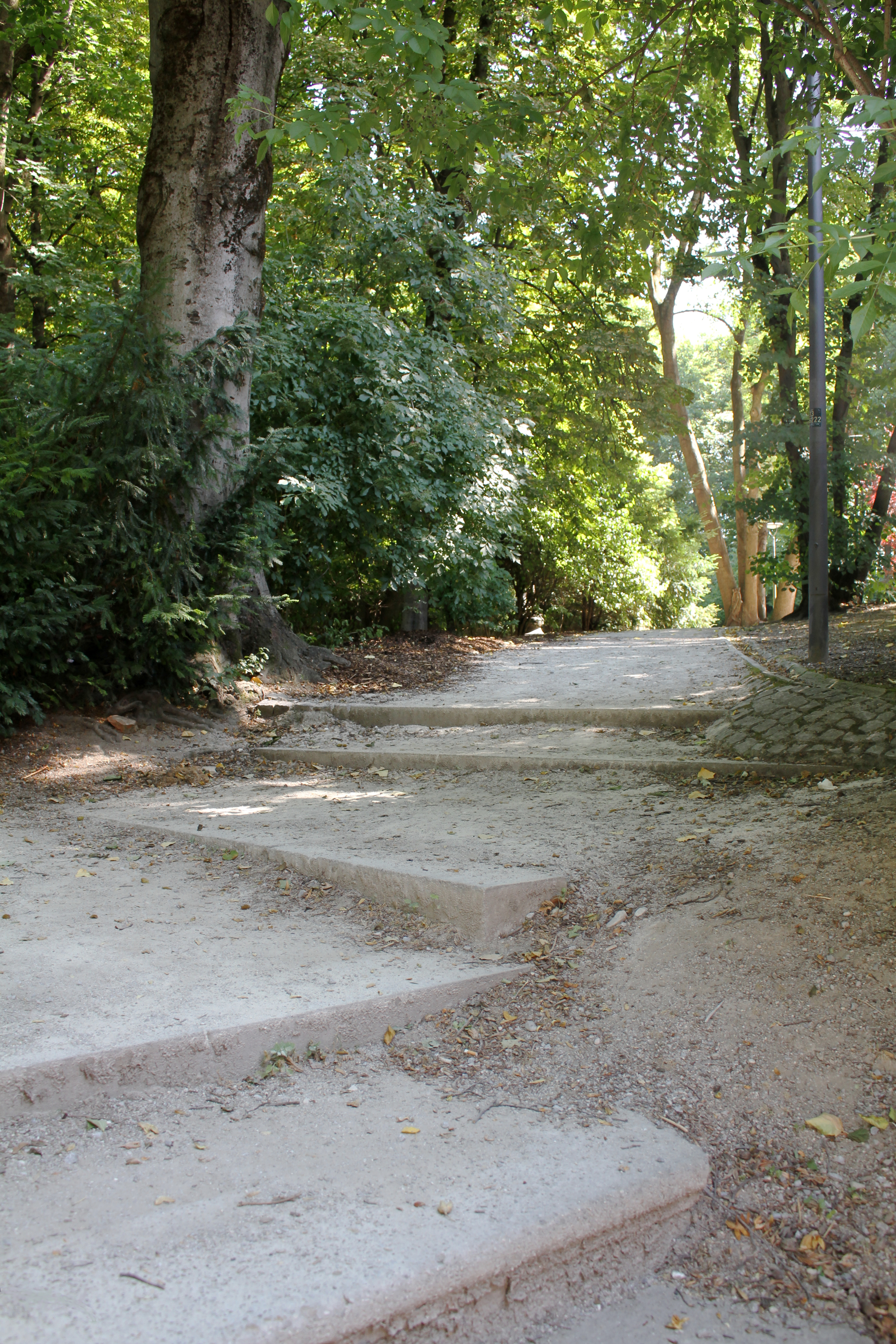 Finanzgarten, München, Germany